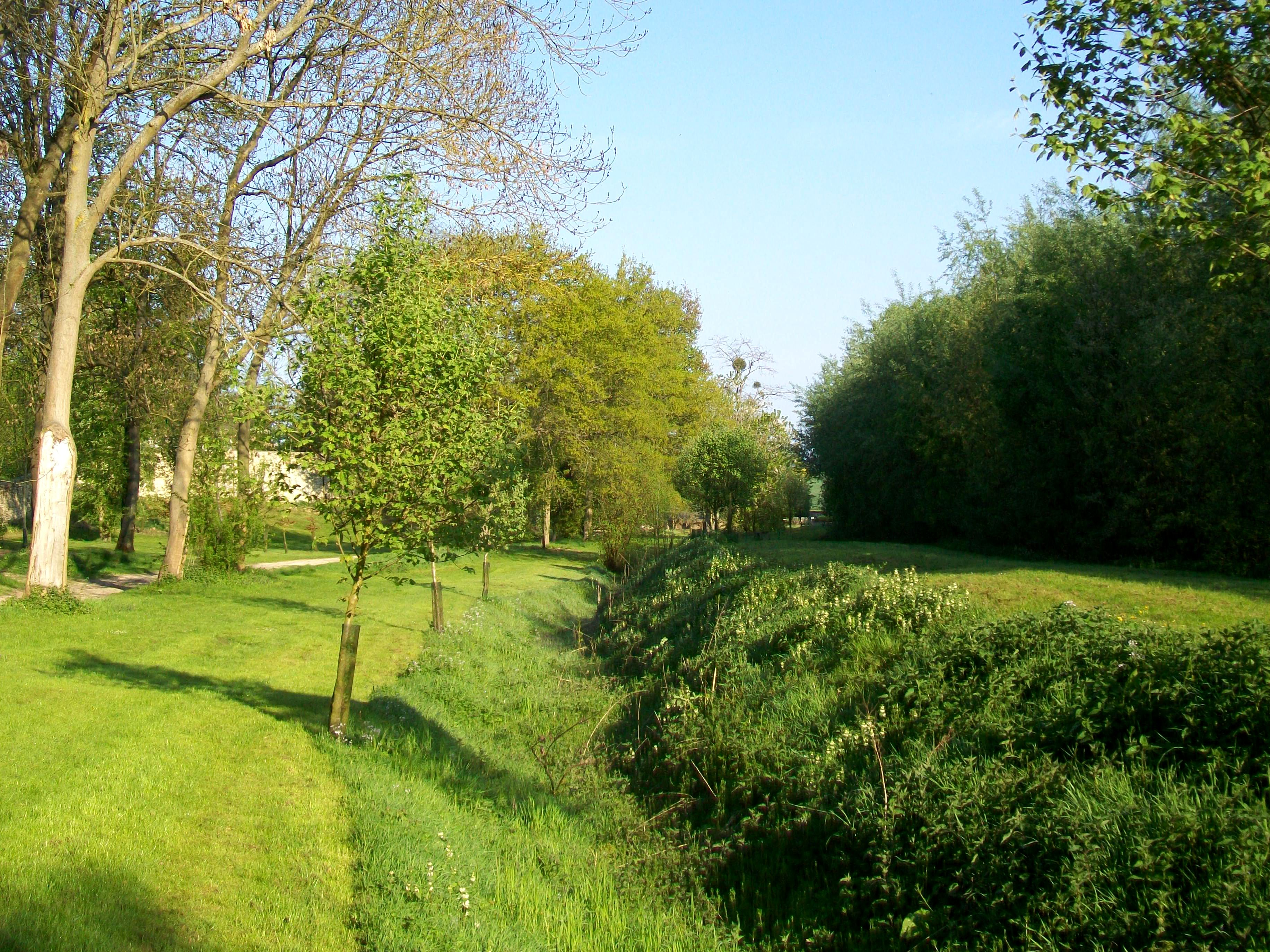 L'Aunette près du prieuré de Bray, environ deux kilomètres après sa source. L'on cherchera aussi en vain l'eau sur cette image. Les nappes phréatiques se sont beaucoup abaissées ici comme presque partout ailleurs dans la région.